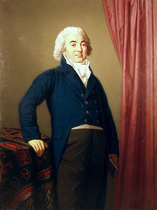 Огюст де Шуазёль-Гуфье, полное имя Мари-Габриэль-Флоран-Огюст де Шуазёль-Гуфье (1752—1817) — французский дипломат, посол Франции в Османской империи, член Французской академии, археолог, исследователь и коллекционер греческих древностей, президент Императорской Академии художеств.